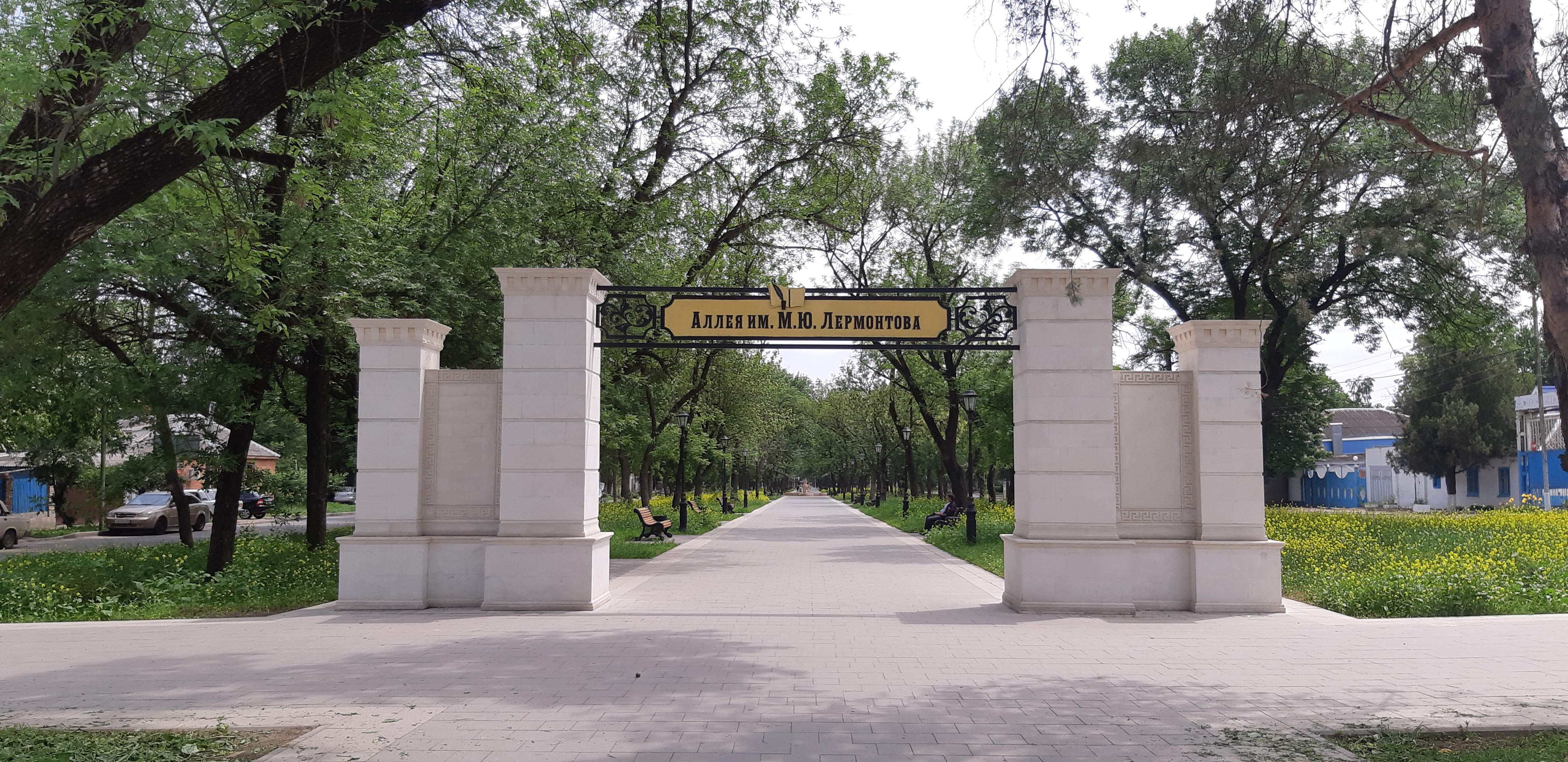 Аллея имени Михаила Лермонтова